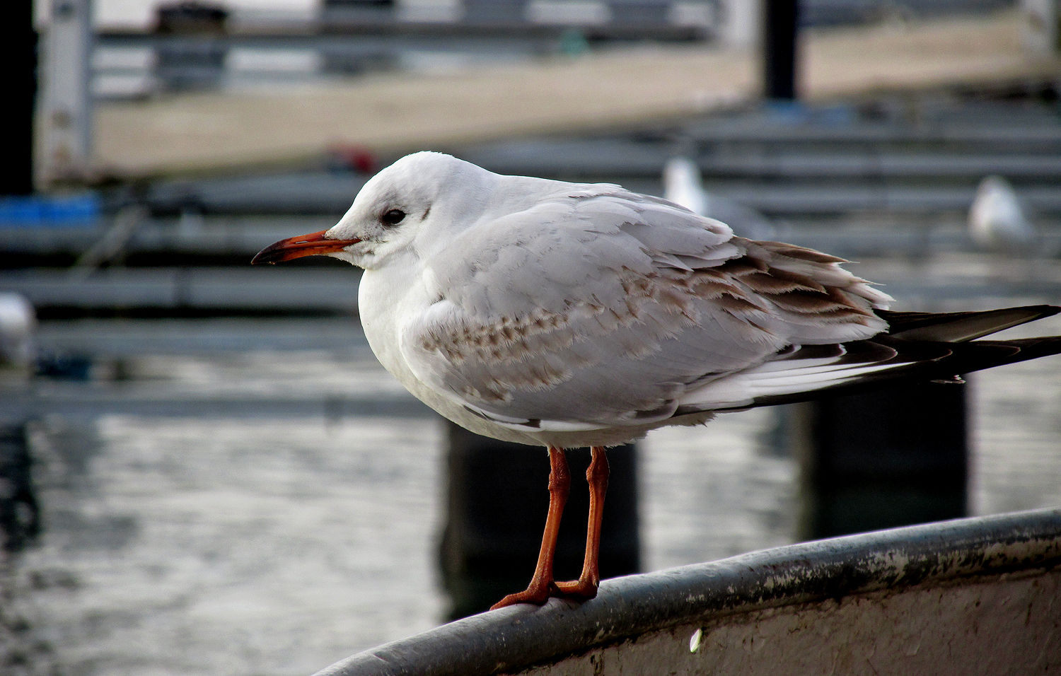 Skrattmås. 2k i vinterdräkt. 27 feb 2016 Ystad.